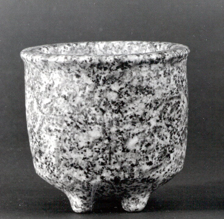 Bowl; Stone-Vessels